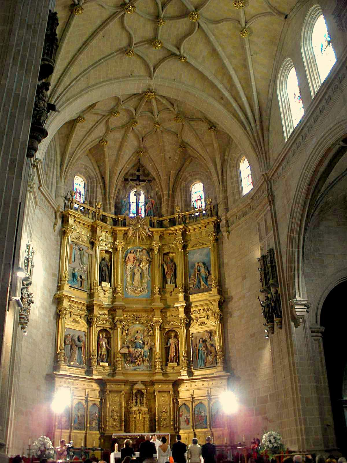 Catedral de Calahorra (La Rioja). Nave principal y retablo mayor